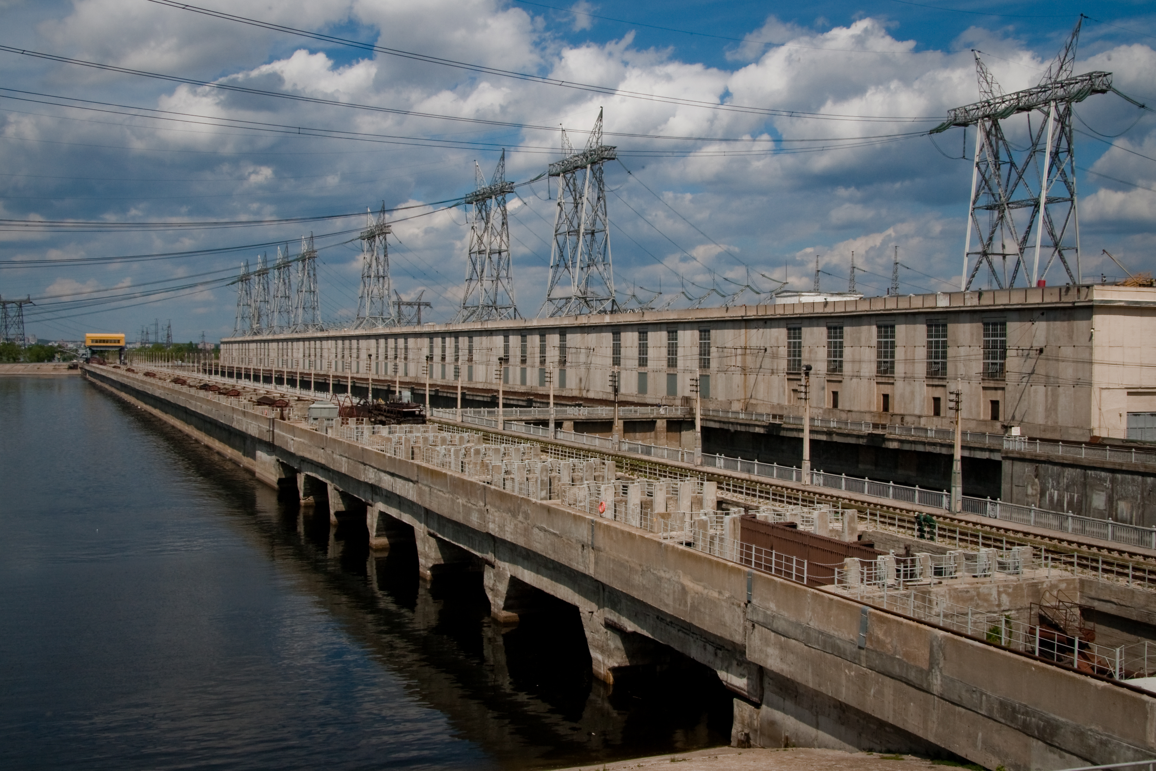 Общий вид сзади. Жигулёвская ГЭС. Жигулёвск-Тольятти. Россия